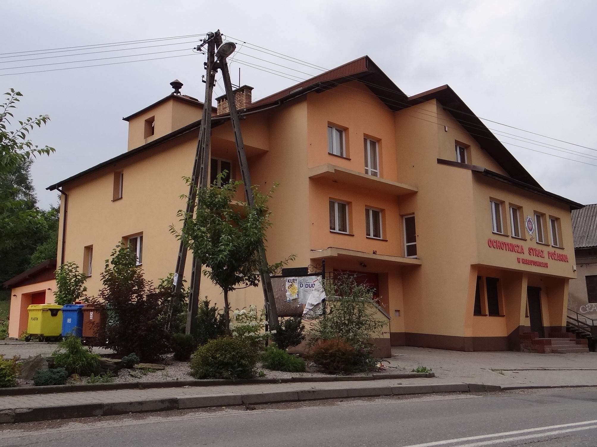 Remiza OSP w Harbutowicach